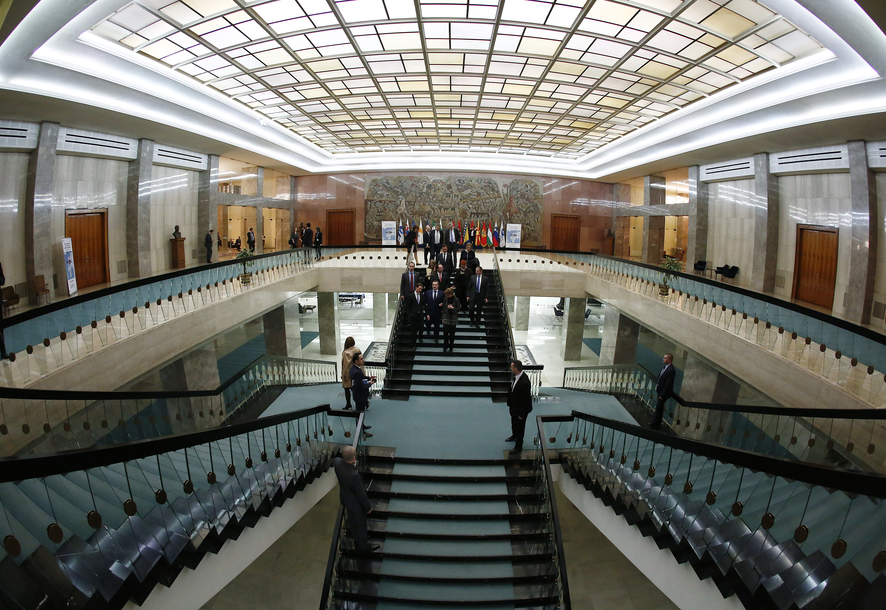 Arbeitsbesuch Serbien. BM Sebastian Kurz trifft den serbischen Außenminister Ivica Dacic. Belgrad, Palata Srbije, 09.02.2016, Foto: Dragan Tatic